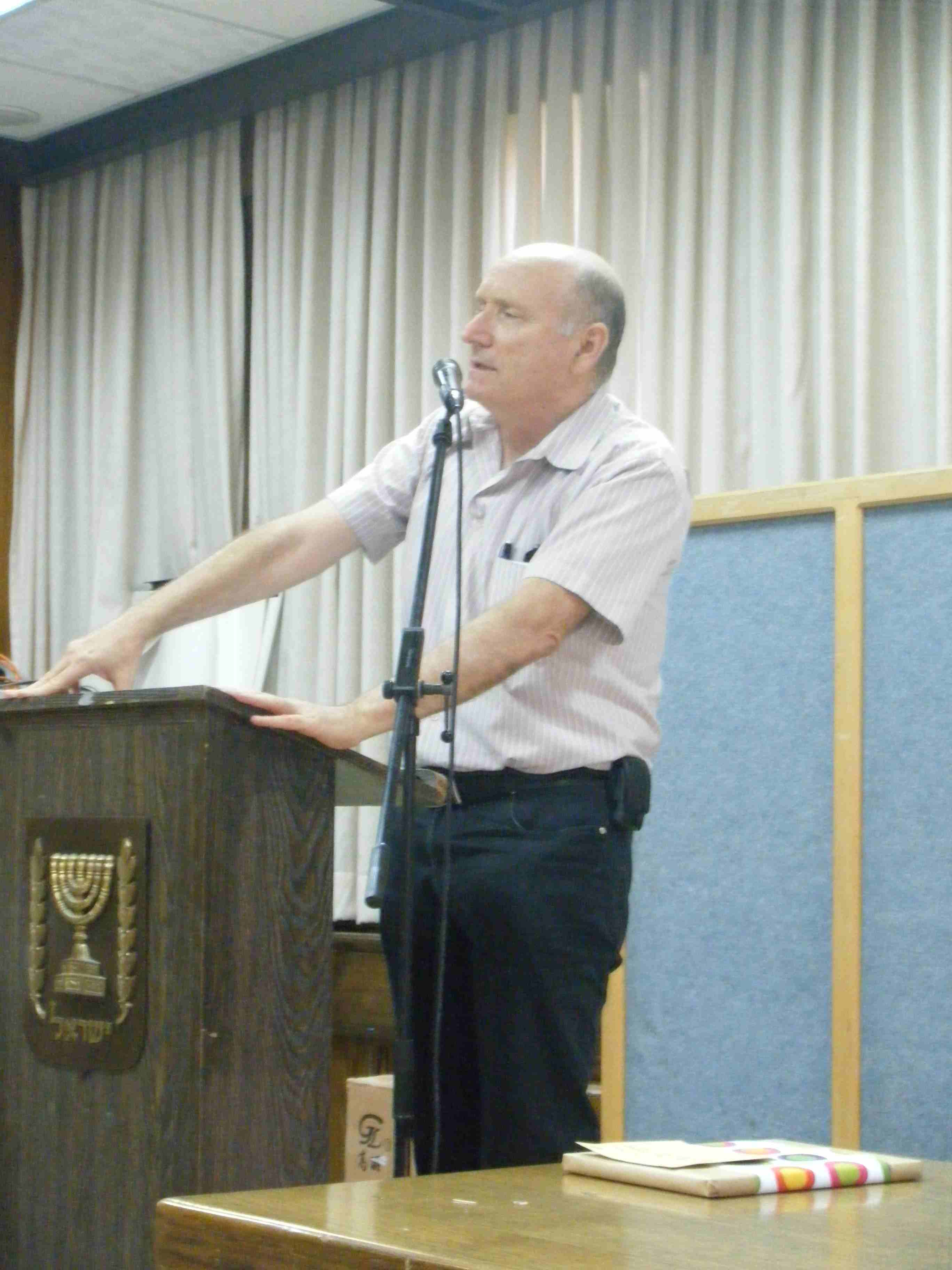 יצחק בריק כנציב קבילות החיילים.